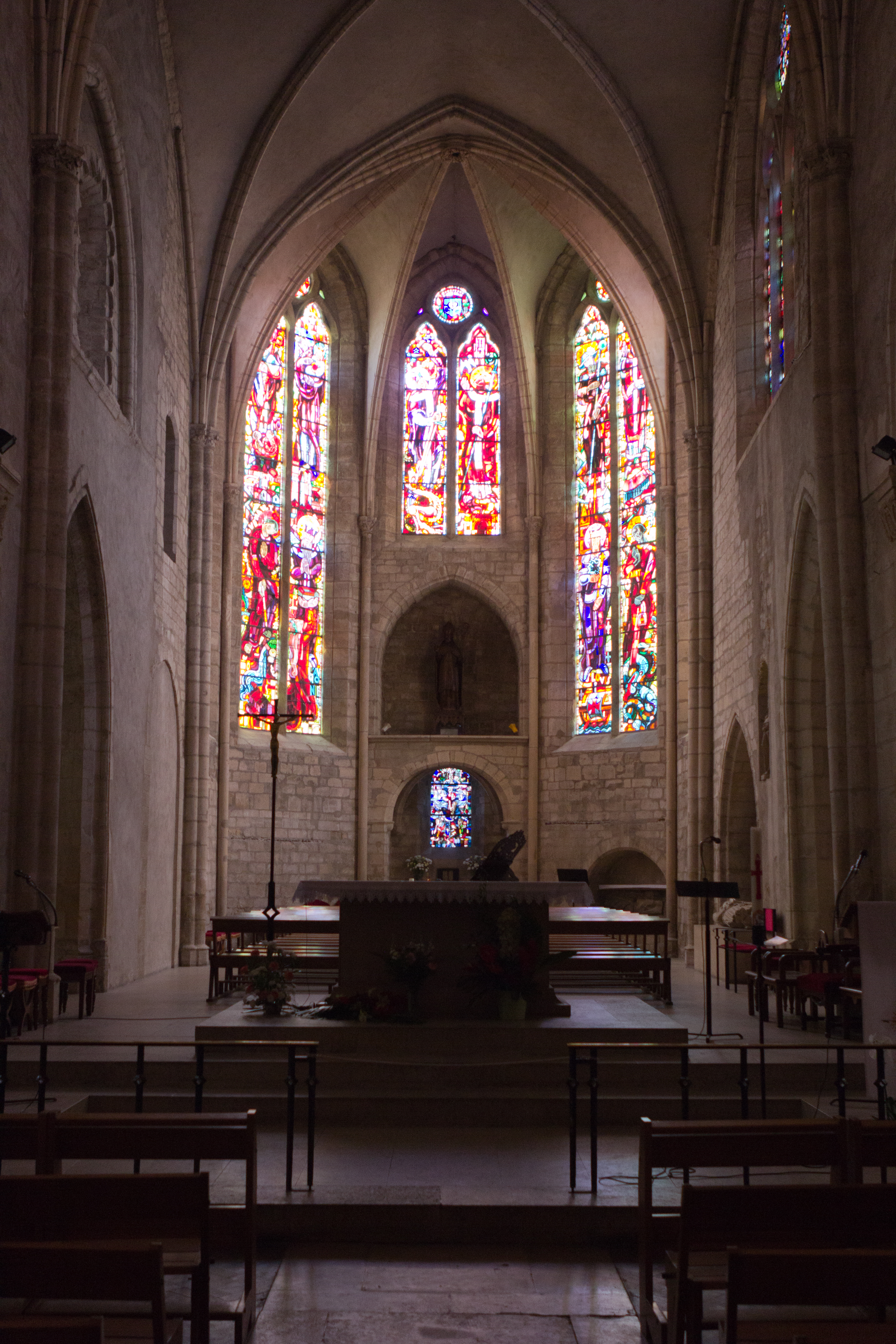 Cathédrale Saint-Spire de Corbeil-Essonnes, Corbeil-Essonnes, Essonne, France